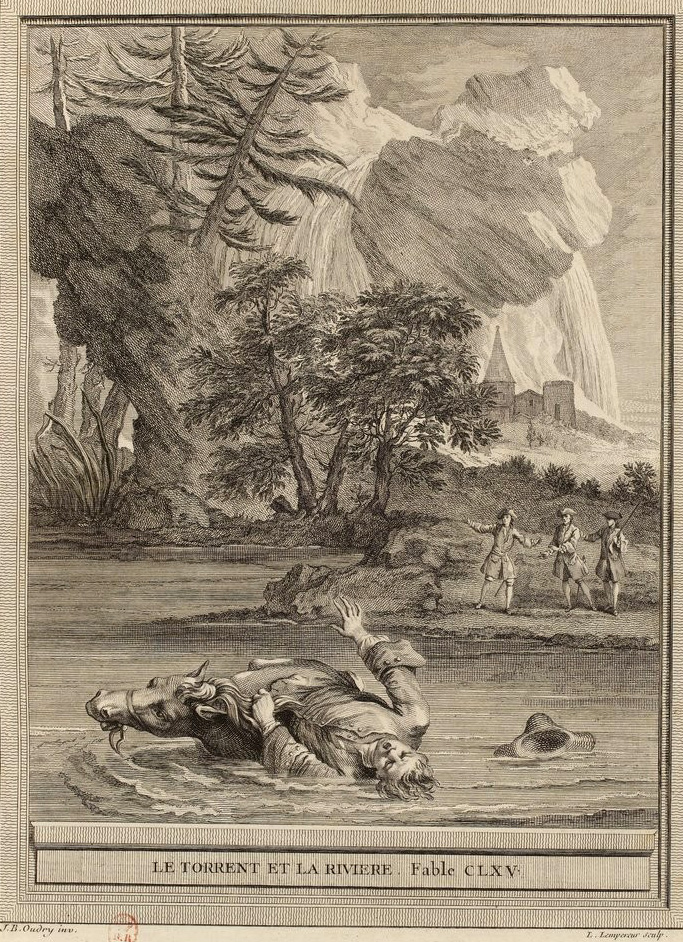 Gravure réalisée par Louis Simon Lempereur d'après un dessin de Jean-Baptiste Oudry représentant la fable Le torrent et la rivière de Jean de La Fontaine (fable 23 du livre VIII). Cette gravure est parue dans l'édition complète des fables de La Fontaine, parue en quatre tomes chez l'éditeur Desaint & Saillant, rue saint Jean de Beauvais à Paris, 1755-1759.